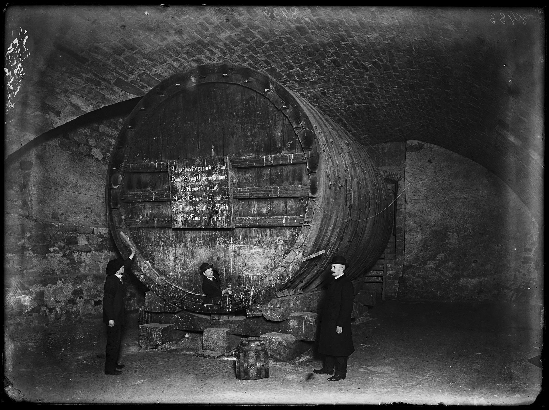 Hohentübingen. Großes Fass im Schlosskeller